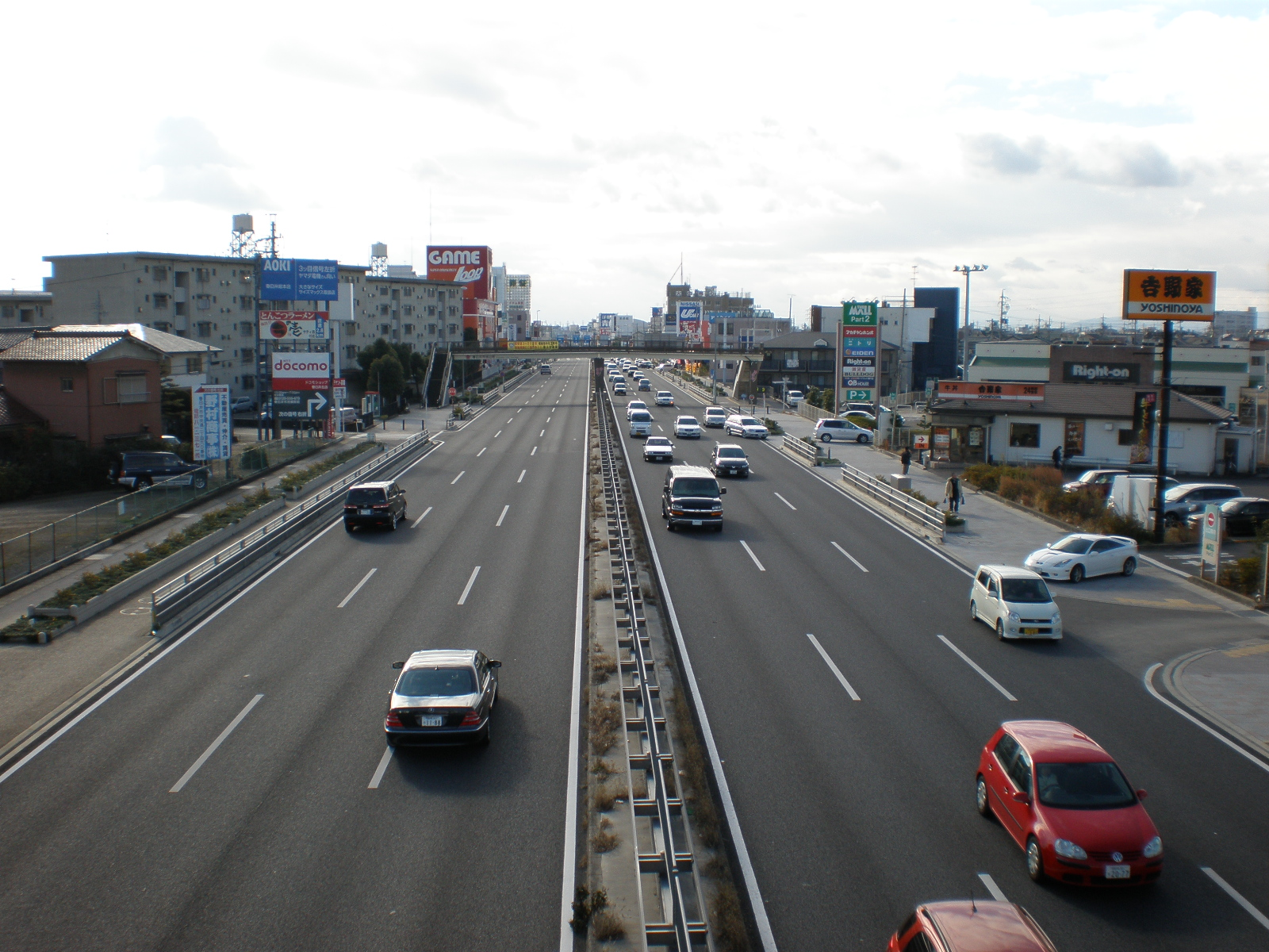 国道19号（撮影場所：愛知県春日井市六軒屋町・浅山町3丁目）